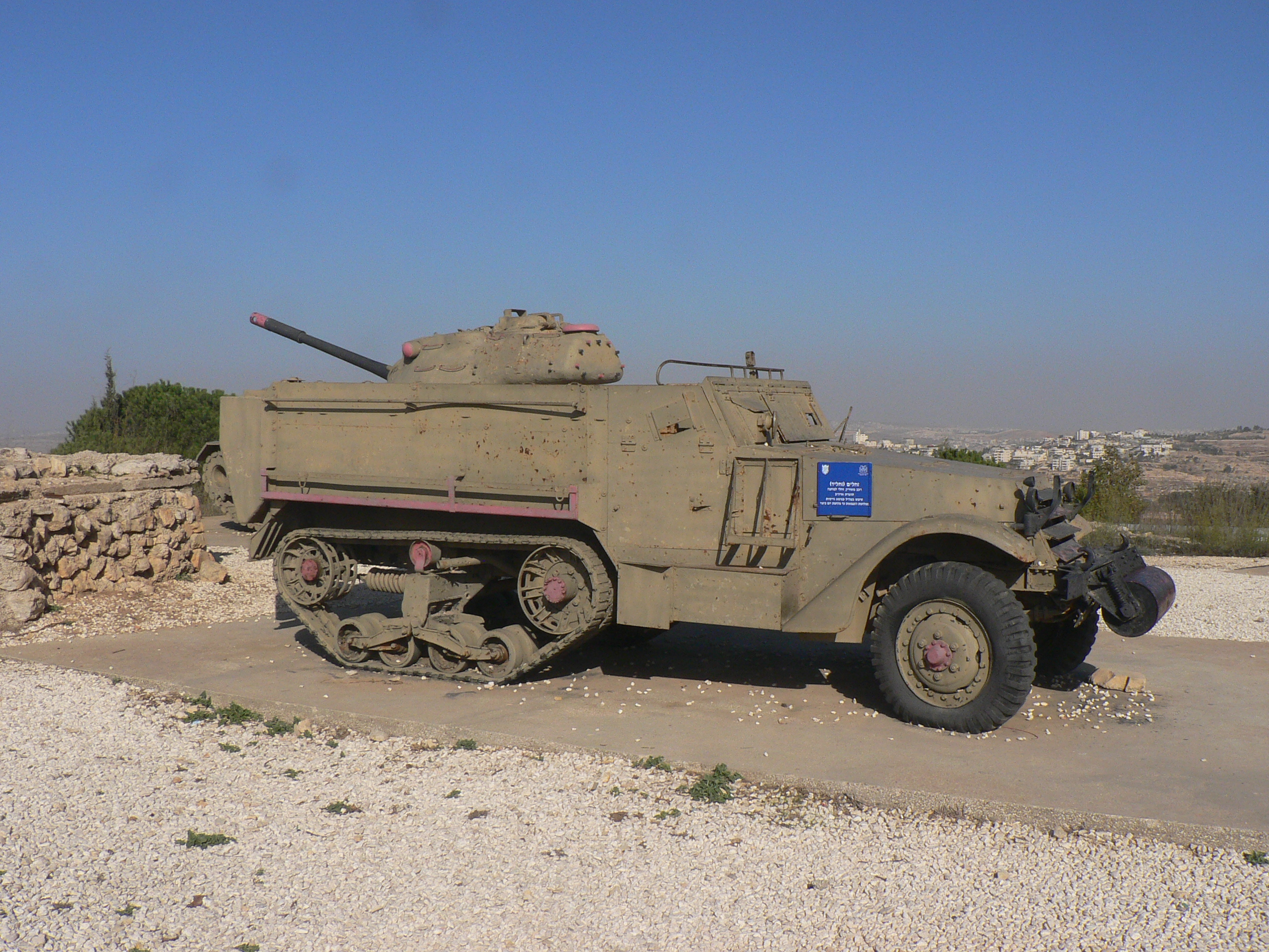 Har Adar Hill (The Radar Hill), Israel - M3 Half-truck, in the backgroun גבעת הר אדר - גבעת הרדאר זחל"ד (זחל"ם דיזל) ברקע - טנק פטון ירדני